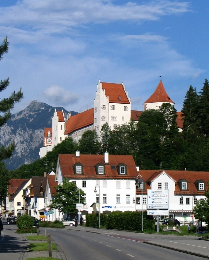 Füssen Bayern Hohes Schloss